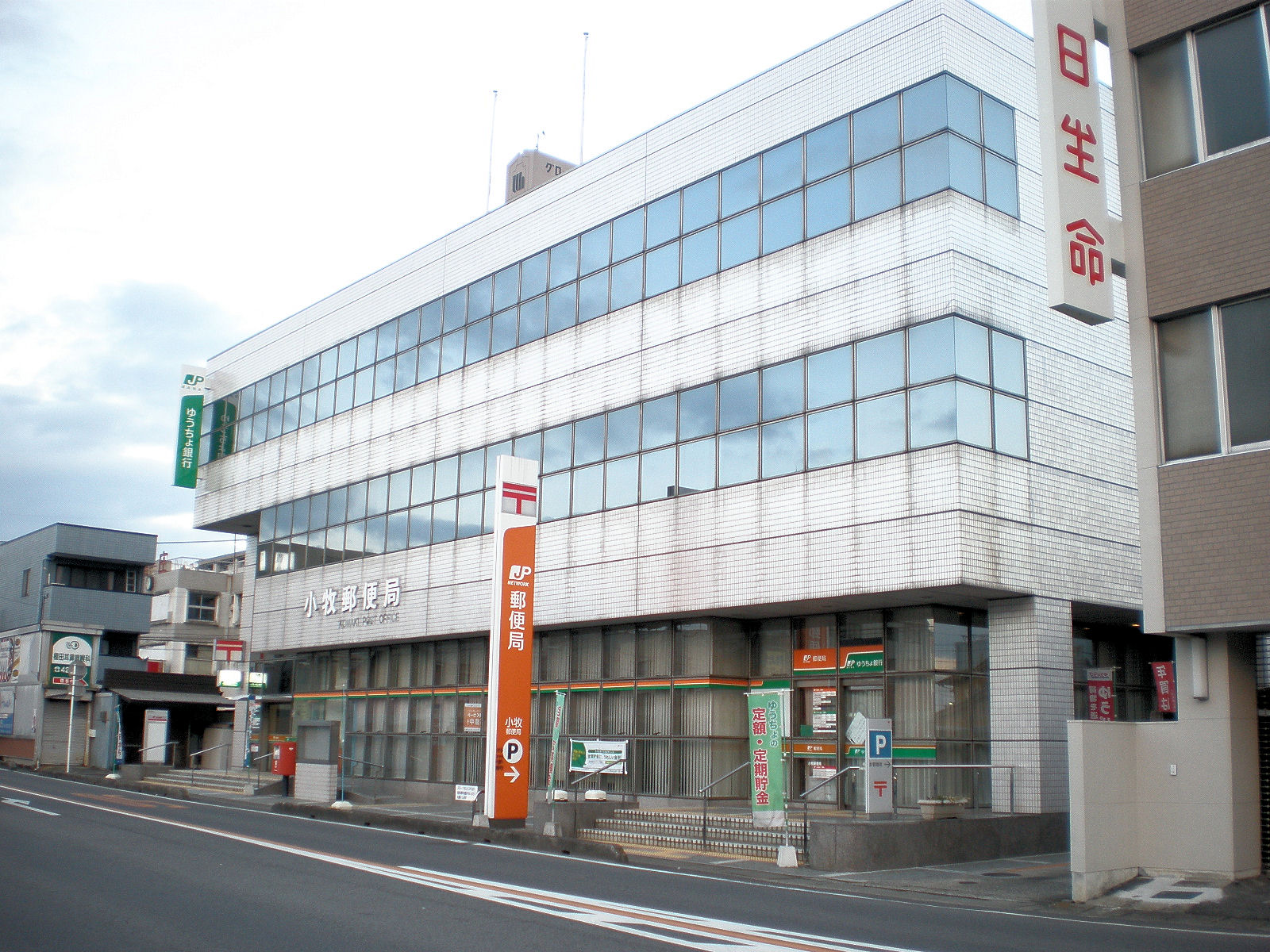 愛知県小牧市にある小牧郵便局